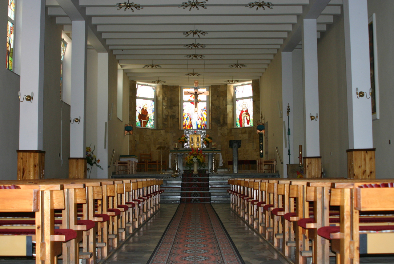 Kirche in Malnia (deutsch Mallnie).